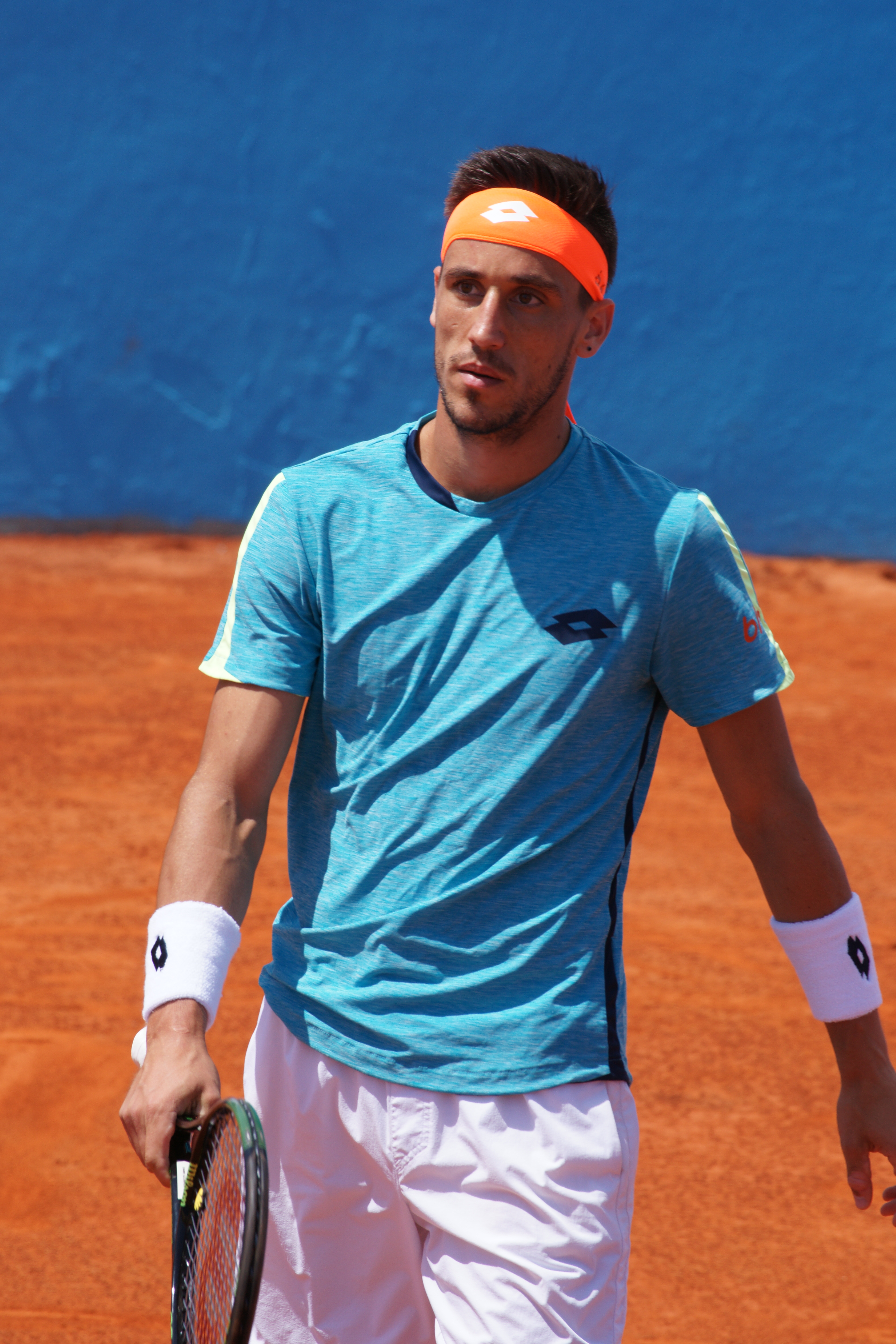 Damir Dzumhur Nice ATP 2016